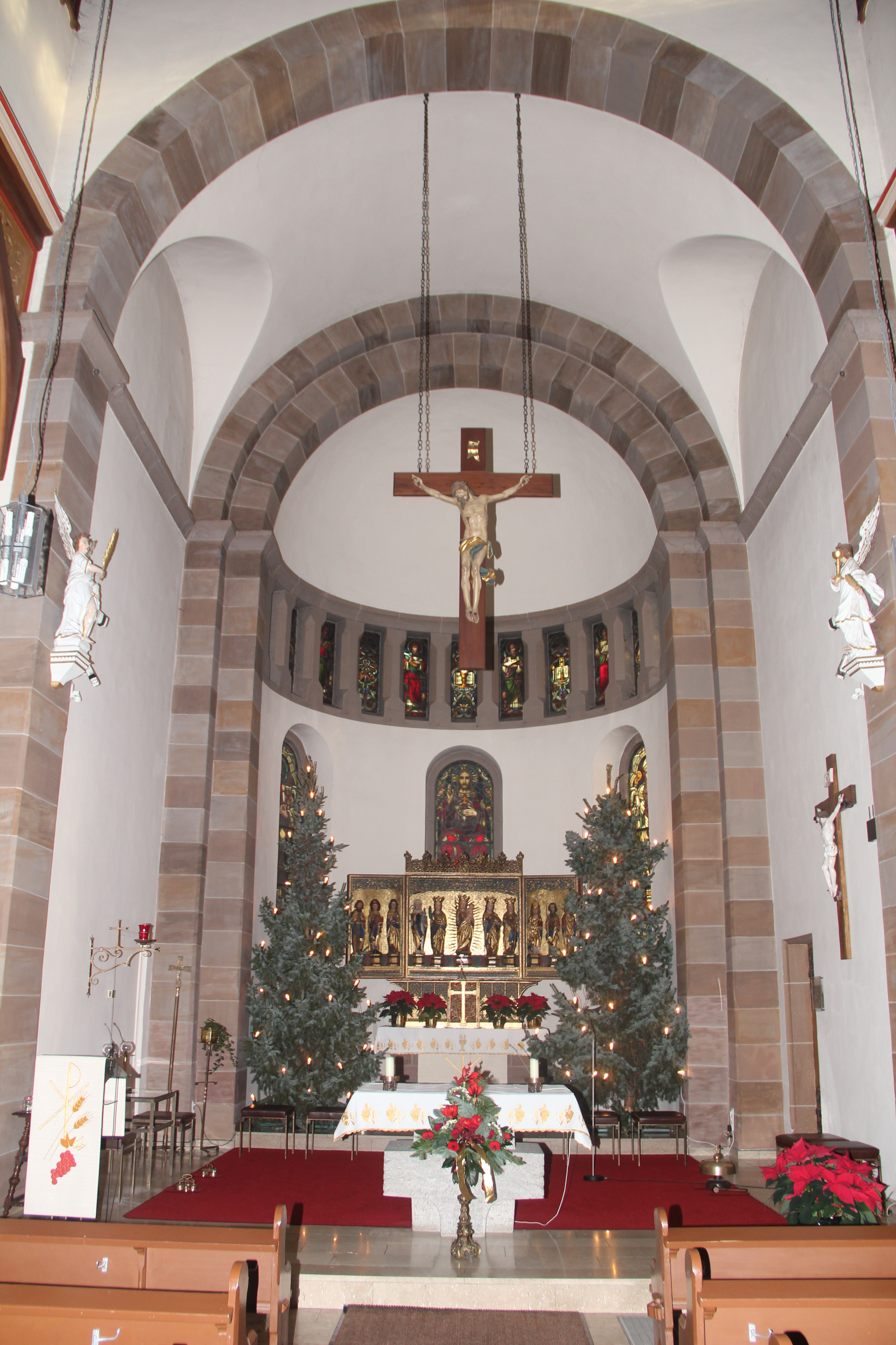 Innenansicht der Kirche St. Andreas in Mingerode